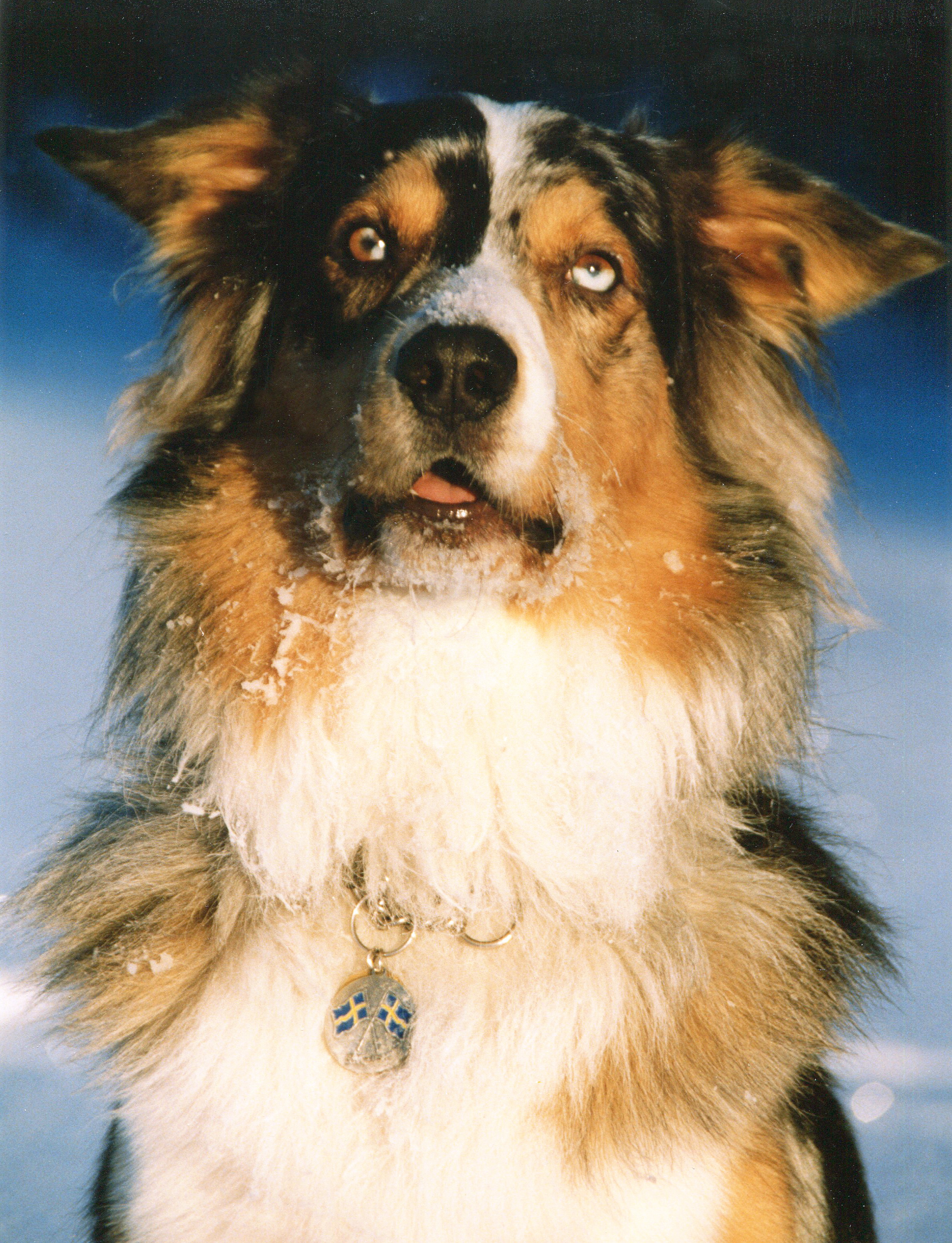 El Merinos "Pollux" (26 oktober 2000 - 22 december 2015), Australian Sheperd, ägare Holger Ellgaard